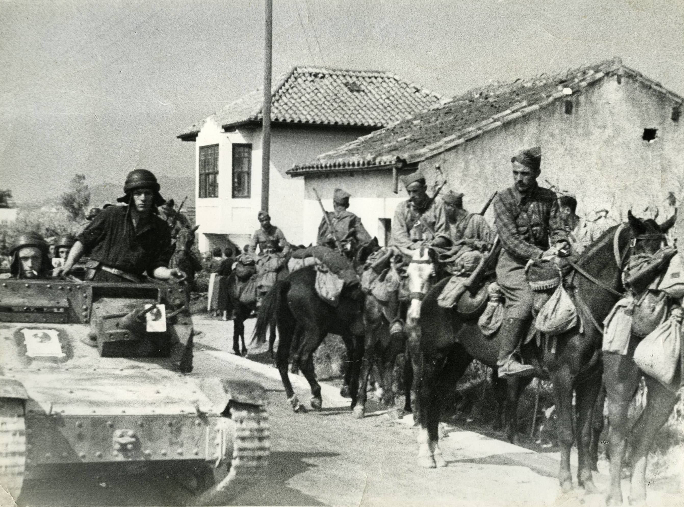 Guerra civil española, frente de Cataluña. Caballería y carros del bando sublevado en uno de los pueblos próximos a Tortosa.